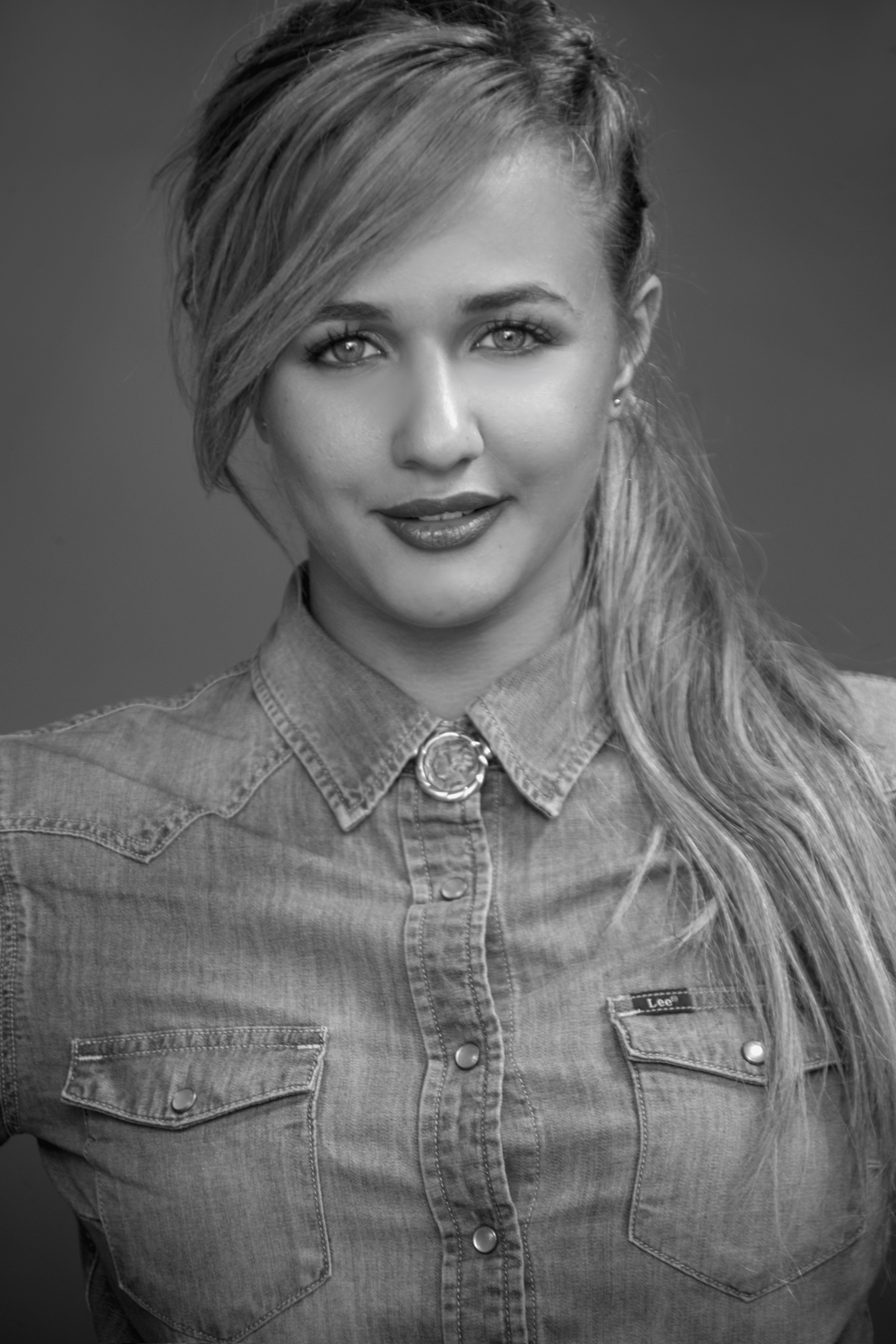 עדן בן זקן - זמרת